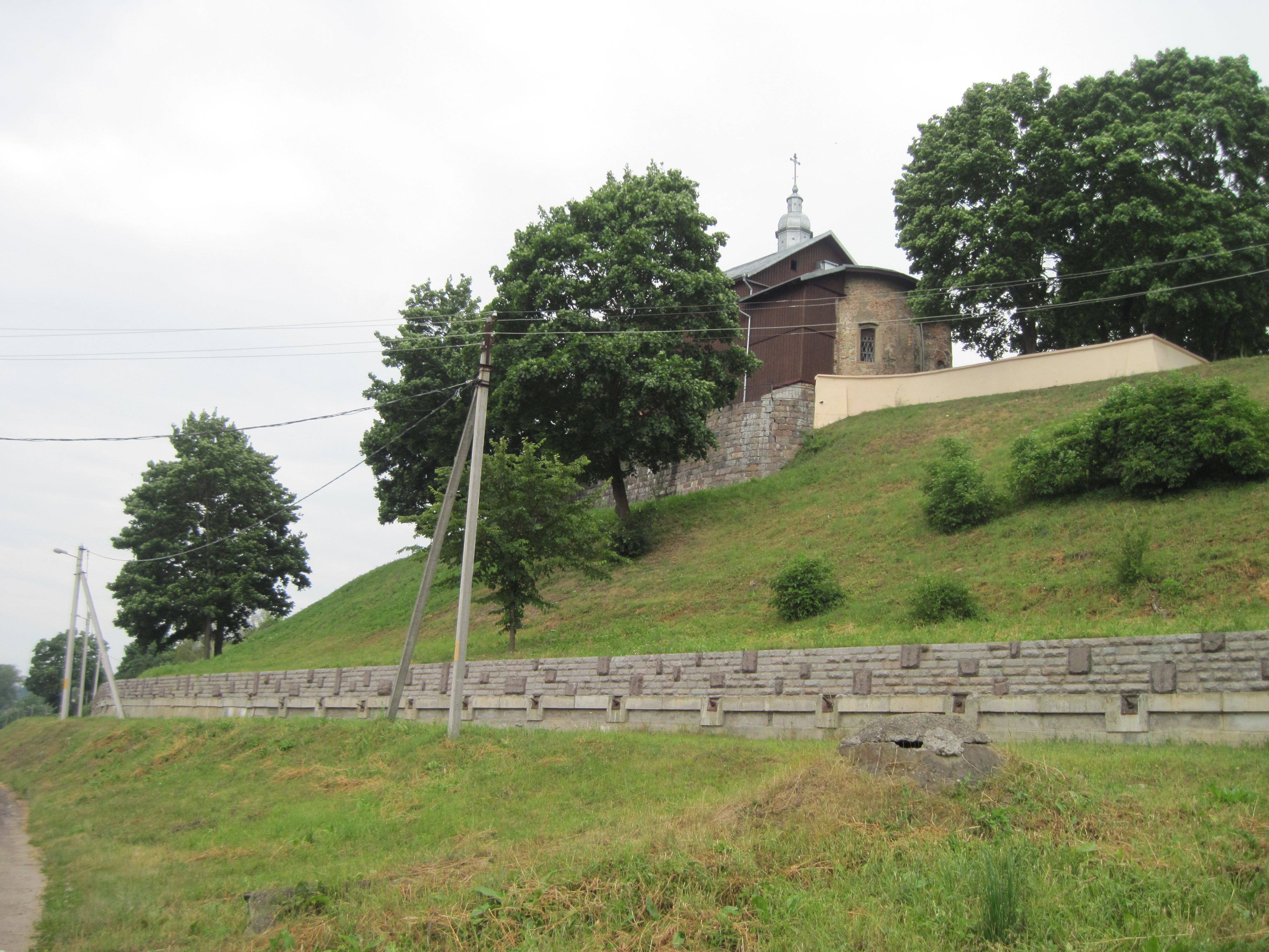 Умацаванне схіла Каложскага пагорка. Каложская царква ў Гродне. Выгляд з боку Немана (з паўднёвага усходу)